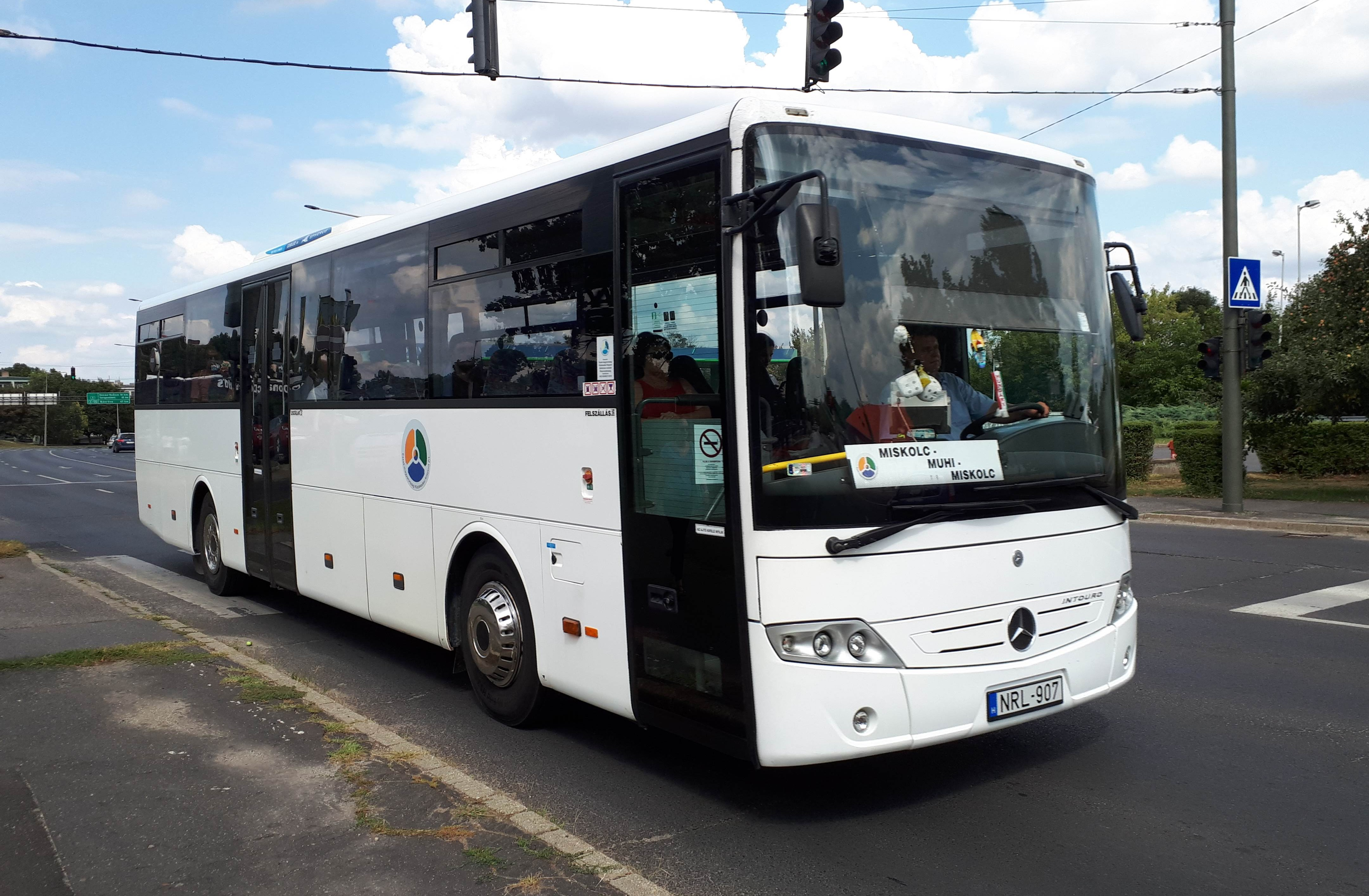 Az ÉMKK NRL-907 rendszámú Mercedes Intouro busza Miskolcon, a 3744-es helyközi járaton.